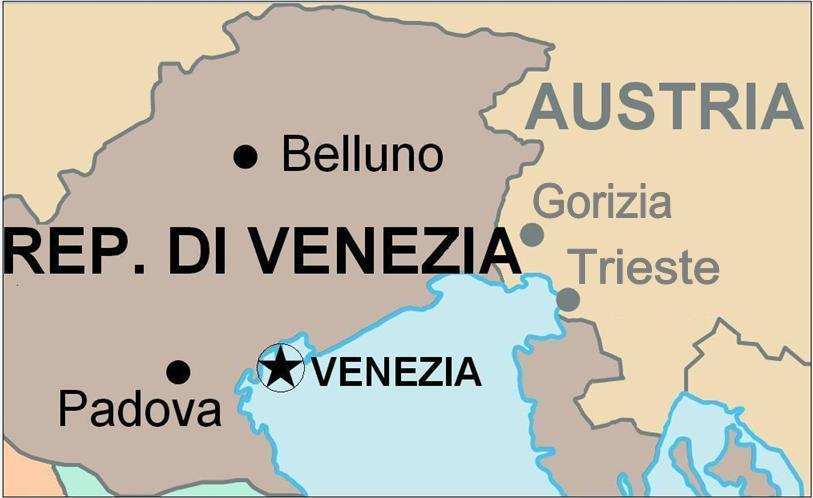 Questo File è stato ricavato (estrazione dettaglio) da un’altra immagine in archivio COMMONS – File:Italia 1494–it.svg inserita il 15 mar 2013 da utente Mess